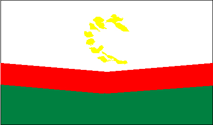 Bandera de Casilda